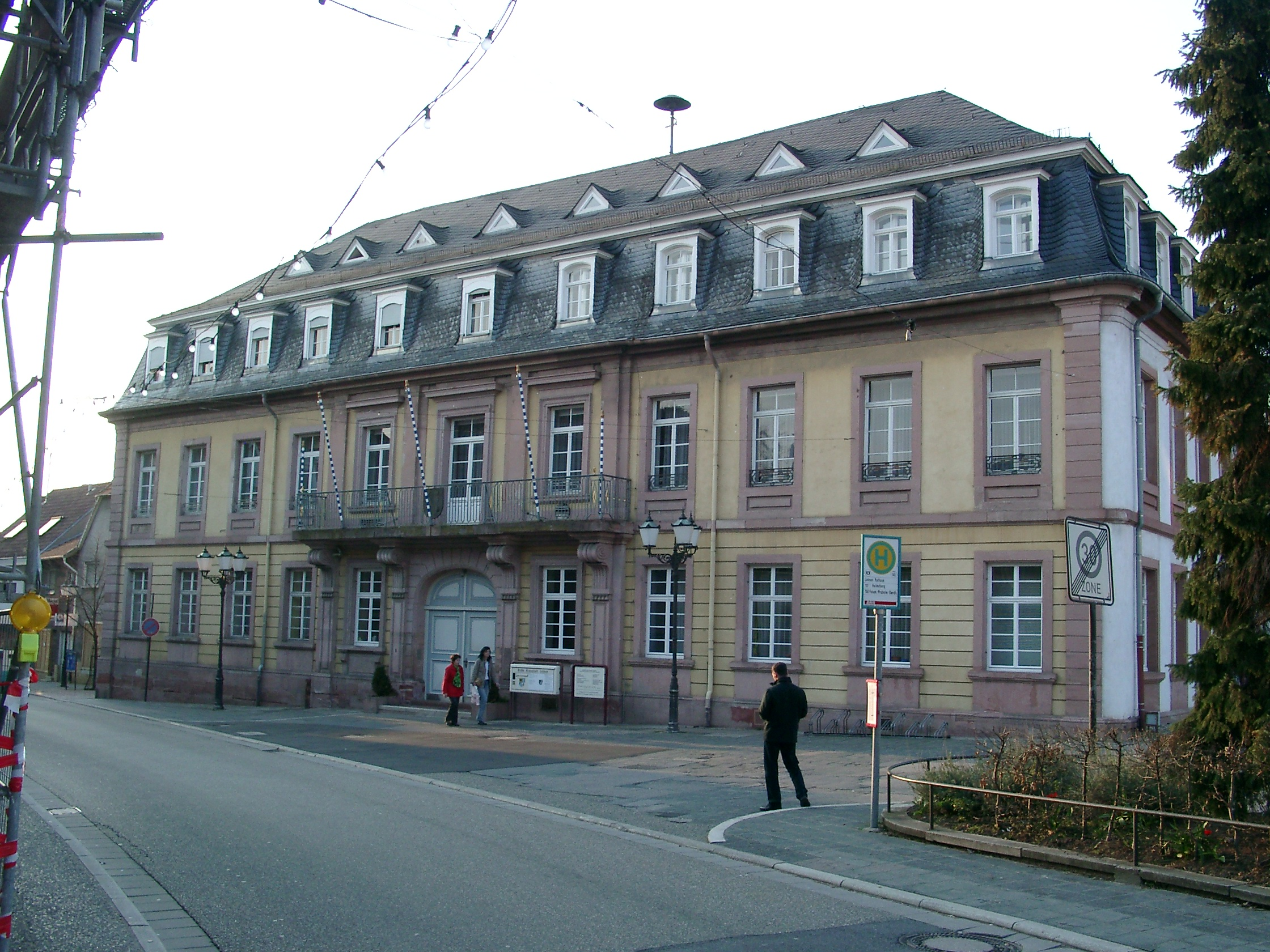 Leimen, Rathaus (ehem. Schloss)